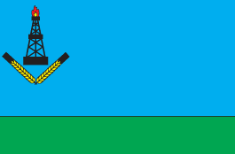 Прапор Краснодонського району